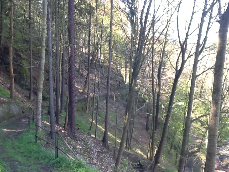 Zámecký park Vila Mattoni Kyselka 2014